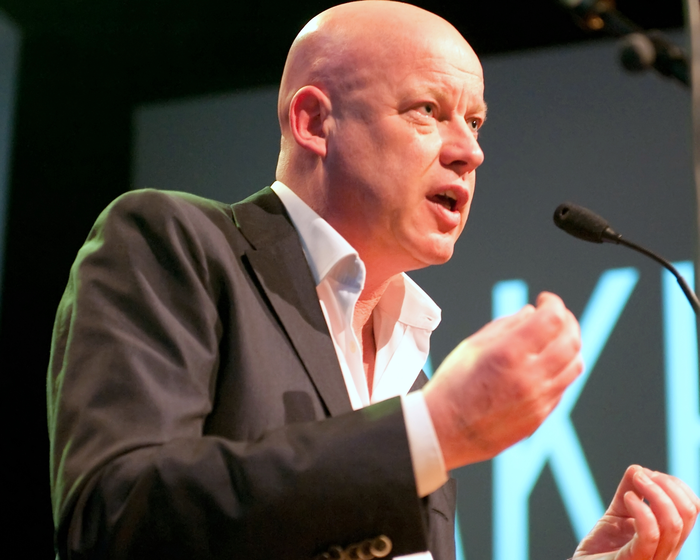 Het feest in Amsterdam was vooral niet politiek beladen. Halsema hield geen campagnepraatje voor GroenLinks, maar prees vooral de vrijheid van meningsuiting in het algemeen. De bijeenkomst bestond verder uit veel dans en optredens van onder andere Ellen ten Damme en Sara Kroos. Femke's #twist